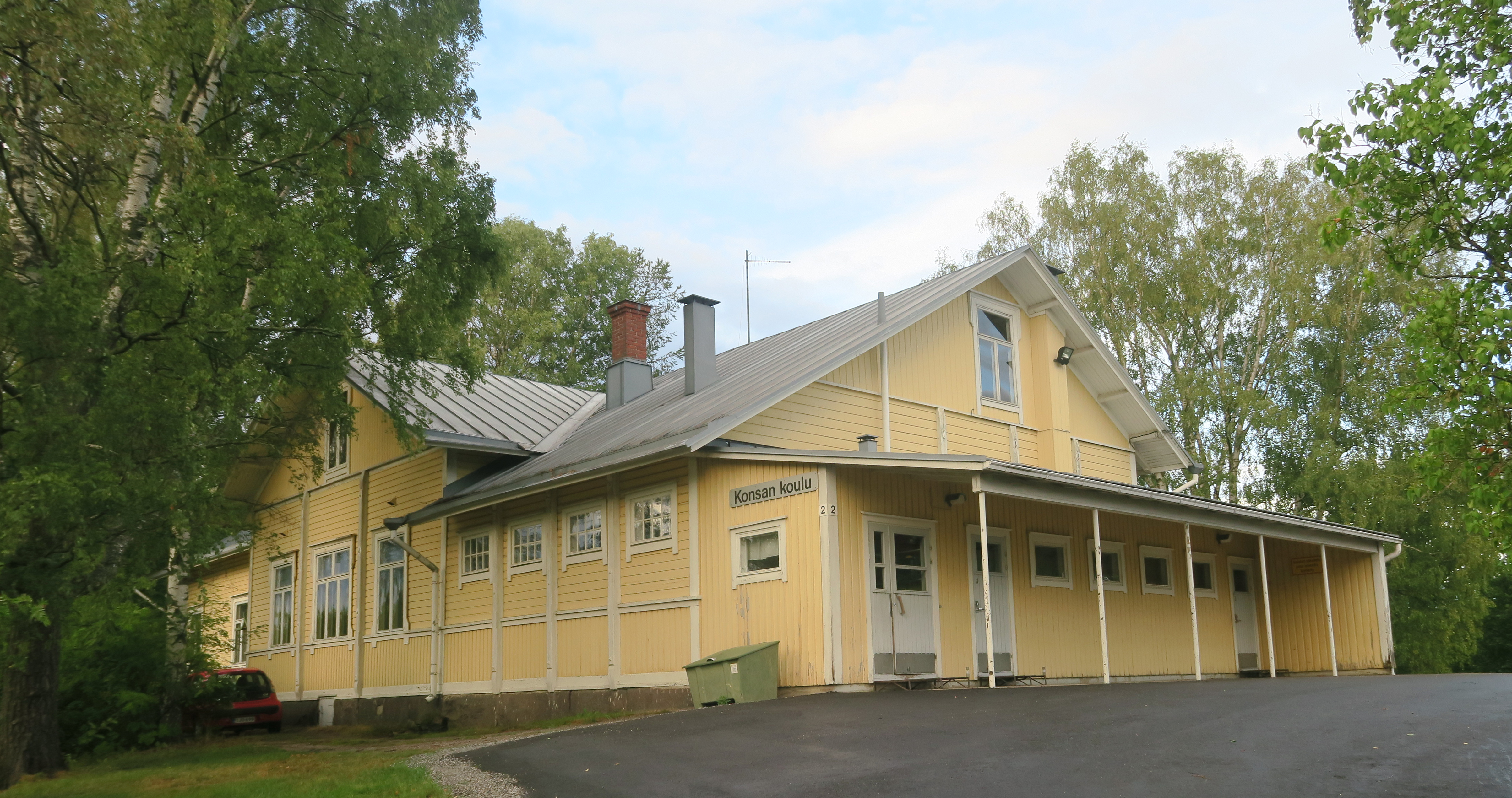 Konsan koulu Raisiossa